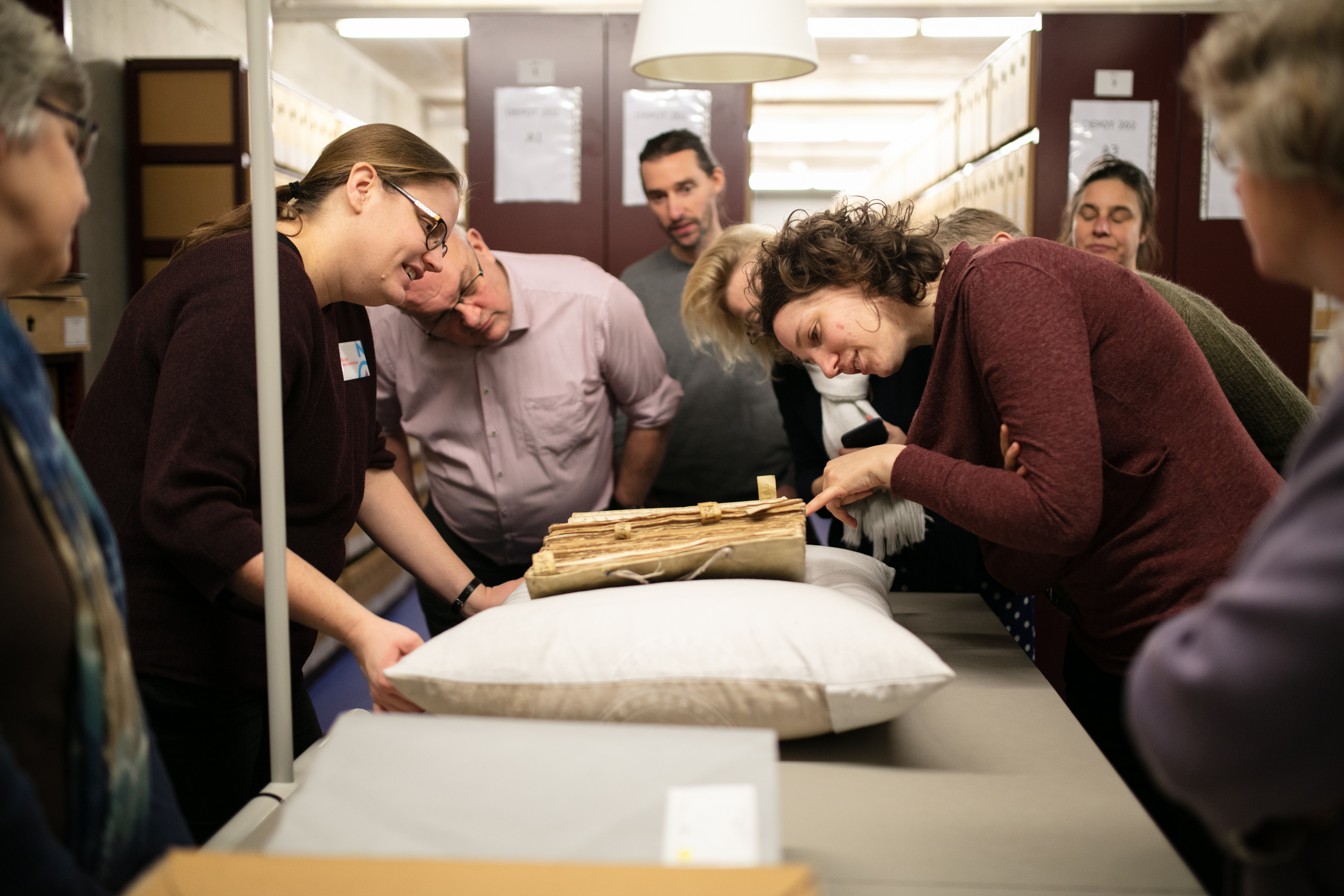 Auteursrechtelijke bescherming is tijdelijk. In Nederland is de vuistregel dat de duur van deze bescherming afloopt op 1 januari, 70 jaar na de dood van de maker. Daarom wordt 1 januari ook publiek domein dag genoemd. Op deze dag komen veel werken beschikbaar die niet meer auteursrechtelijk beschermd worden. Op 3 januari 2019 werd aandacht besteed aan de makers die in 1948 overleden zijn en hun werken die in het publieke domein terecht zijn gekomen. Deelnemers kregen ook een rondleiding door het archief van het Nationaal Archief. Publiek Domein Dag is een initiatief van Creative Commons Nederland en de Koninklijke Bibliotheek. De dag wordt mede mogelijk gemaakt door Circular Content, IP Squared, het Nationaal Archief en Wikimedia Nederland. Kijk voor meer informatie op